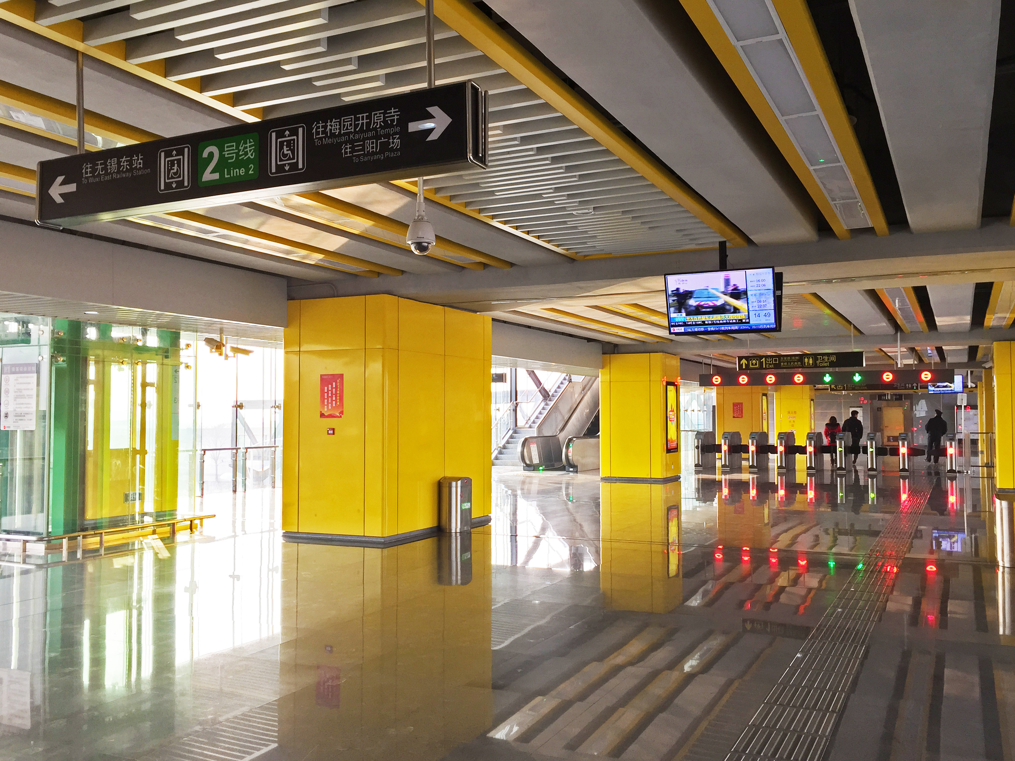 无锡地铁查桥站站厅